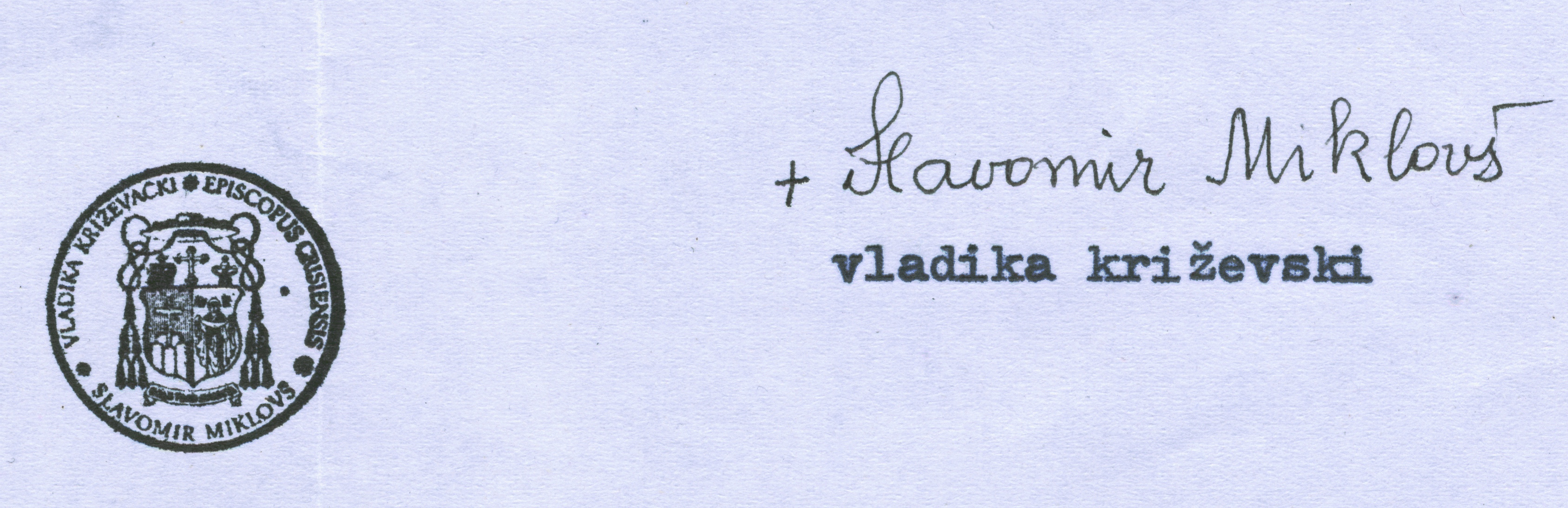 Славомир Мікловш, підпис із 1991 року. Document scanned by Jozafát Vladimír Timkovič, OSBM